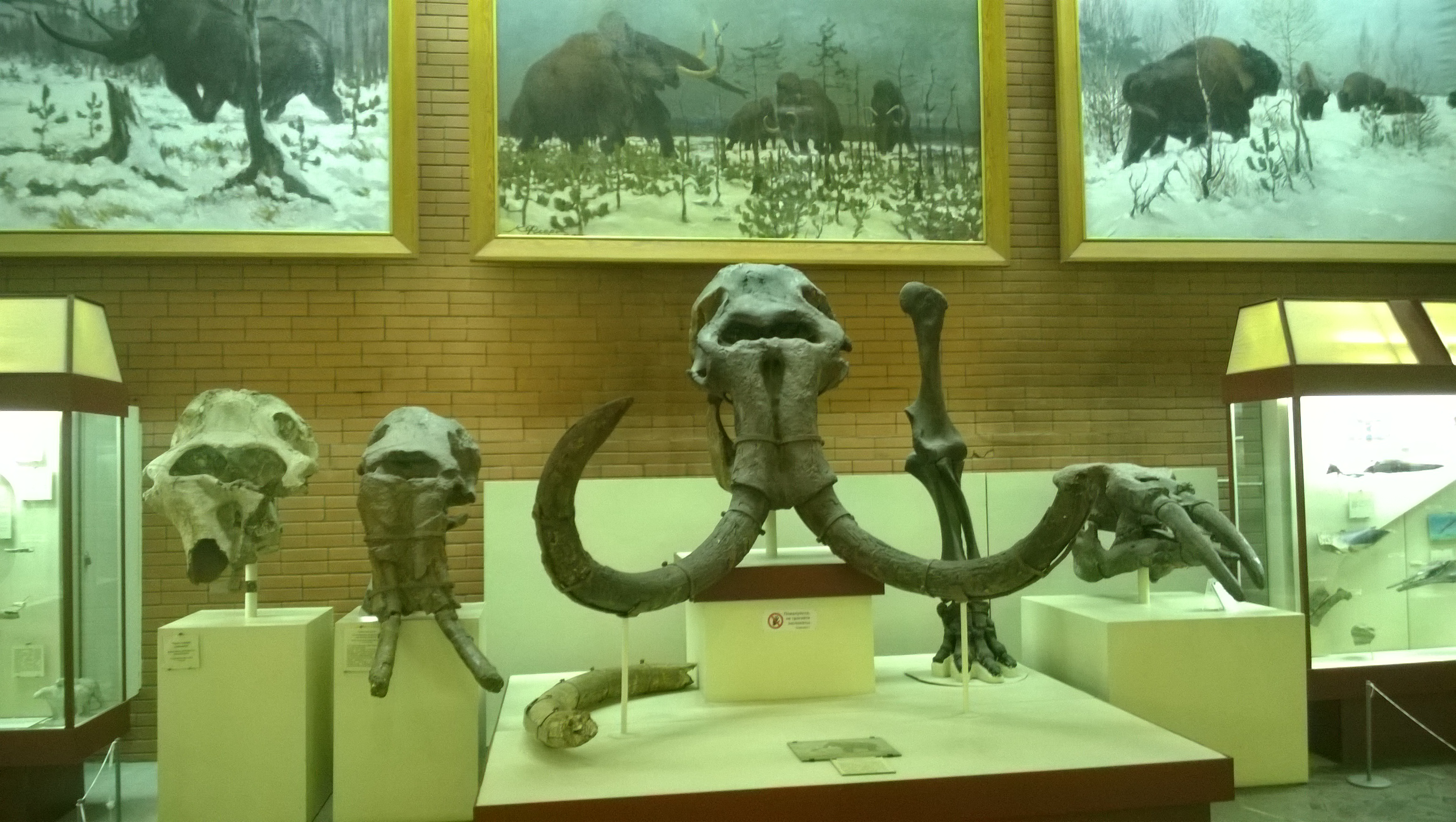 Легенда о циклопе (череп мамонта). Палеонтологический музей. Москва. Июнь 2014